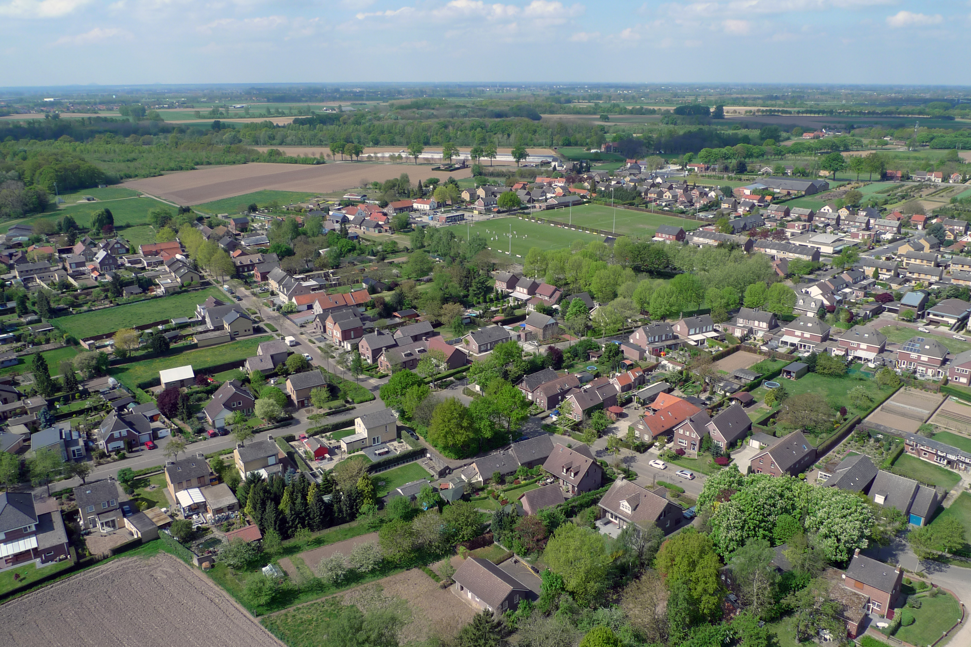 De Slek vanuit de lucht. Foto genomen op zaterdag 19 april 2014 vanuit een hoogte van ongeveer 100 meter. Kruising Slekkerstraat, Marktsingel, Rutsekovenstraat. Met het voetbalterrein van de Slekker Boys. Op de achtergrond de Rijksweg N276.